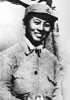 辛锐，抗日英烈，1941年牺牲于山东费县大青山